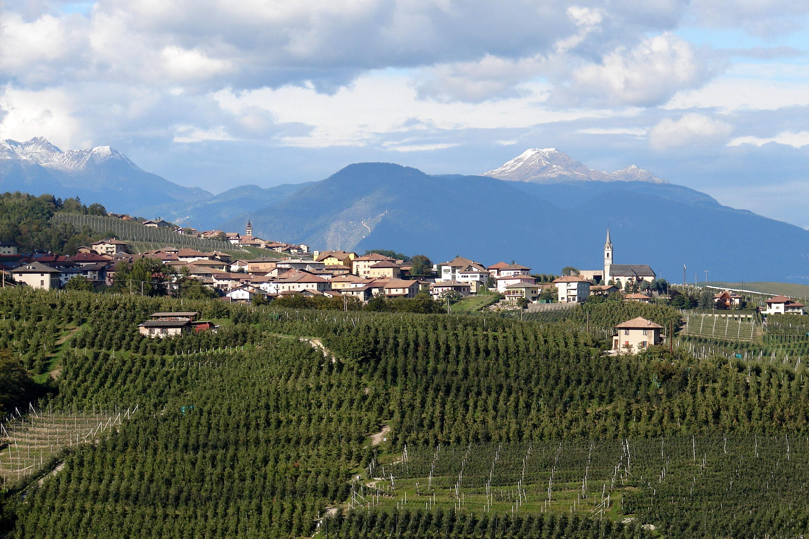 Campodenno ist eine nordostitalienische Gemeinde (comune) mit 1500 Einwohnern.